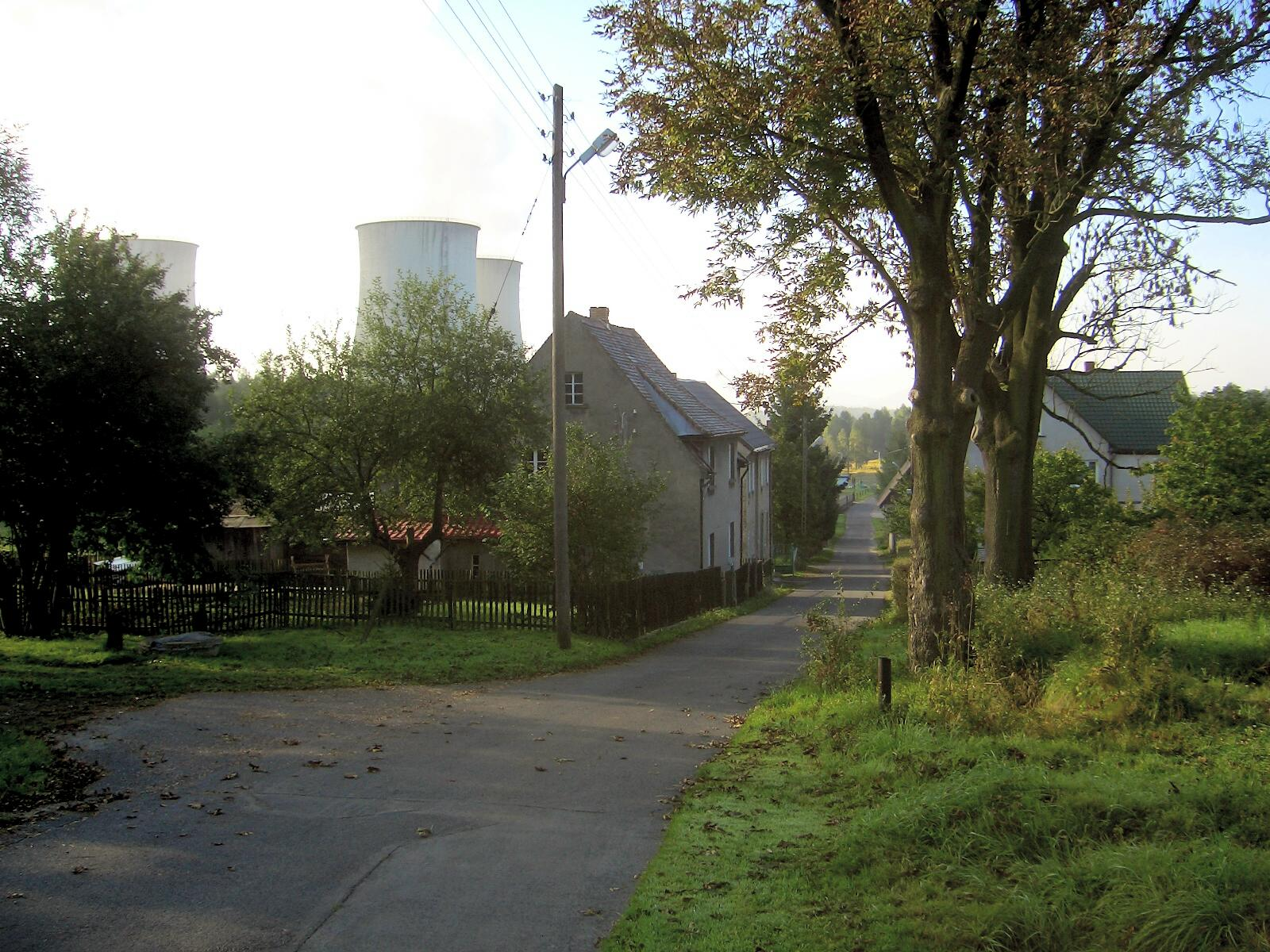 Häuser von Rohnau, im Hintergrund die Kühltürme vom Kraftwerk Turów